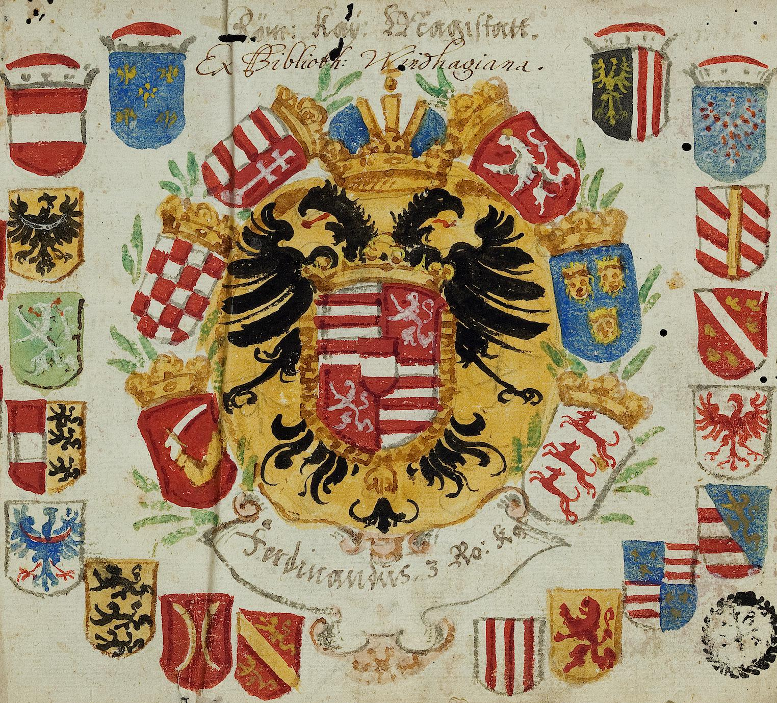 == Kolorierte Wappenbücher aus der Bibliotheca Windhagiana == Die kolorierten Wappenbücher aus der Bibliotheca Windhagiana sind über folgende vier Links zugänglich: Windhag, Joachim von [Bearb.]: Koloriertes Wappenbuch: 1. Wappen der Kaiser und Könige der Welt; 2. Kurfürsten, Fürsten, Herzöge und Grafen; 3. Freiherren und Herren; 4. Österreichischer Adel..., [o.O.], 16. Jh. Windhag, Joachim von [Bearb.]: Koloriertes Wappenbuch: Die Stände des Heiligen Römischen Reiches zur Zeit seines Übergangs auf die Deutschen: Kurfürsten, Herzöge, Fürsten, Grafen, Herren, Ritterschaft und Reichsstädte sowie österreichische Adlige, [o.O.], 16. Jh. Windhag, Joachim von [Bearb.]: Koloriertes Wappenbuch: Wappen afrikanischer, asiatischer und amerikanischer Könige; Wappen deutscher, französischer, spanischer und anderer Herzöge, Grafen, Freiherren, Ritter und adliger Familien sowie österreichischer Adliger, [o.O.], 16. Jh. Windhag, Joachim von [Bearb.]: Koloriertes Wappenbuch: Wappen der Erzpatriarche, Kardinäle, Erzbischöfe, Bischöfe, Fürstäbte, Äbte, Pröpste, Orden, Kreuzritter, Äbtissinnen und Frauenklöster in Europa..., [o.O.], 16. Jh.--NearEMPTiness (Diskussion) 15:26, 27. Jul. 2014 (CEST)